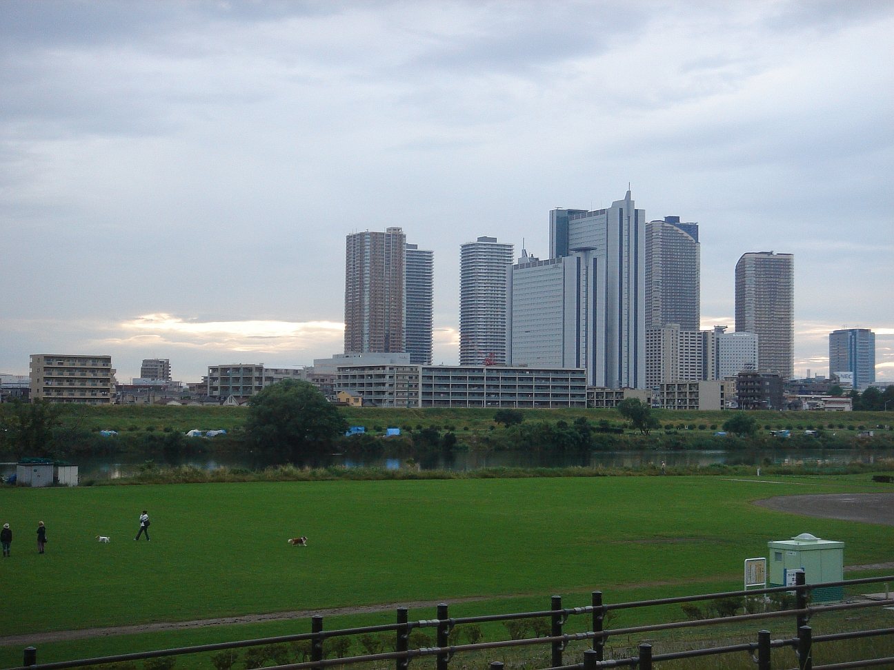 Tamagawa-River